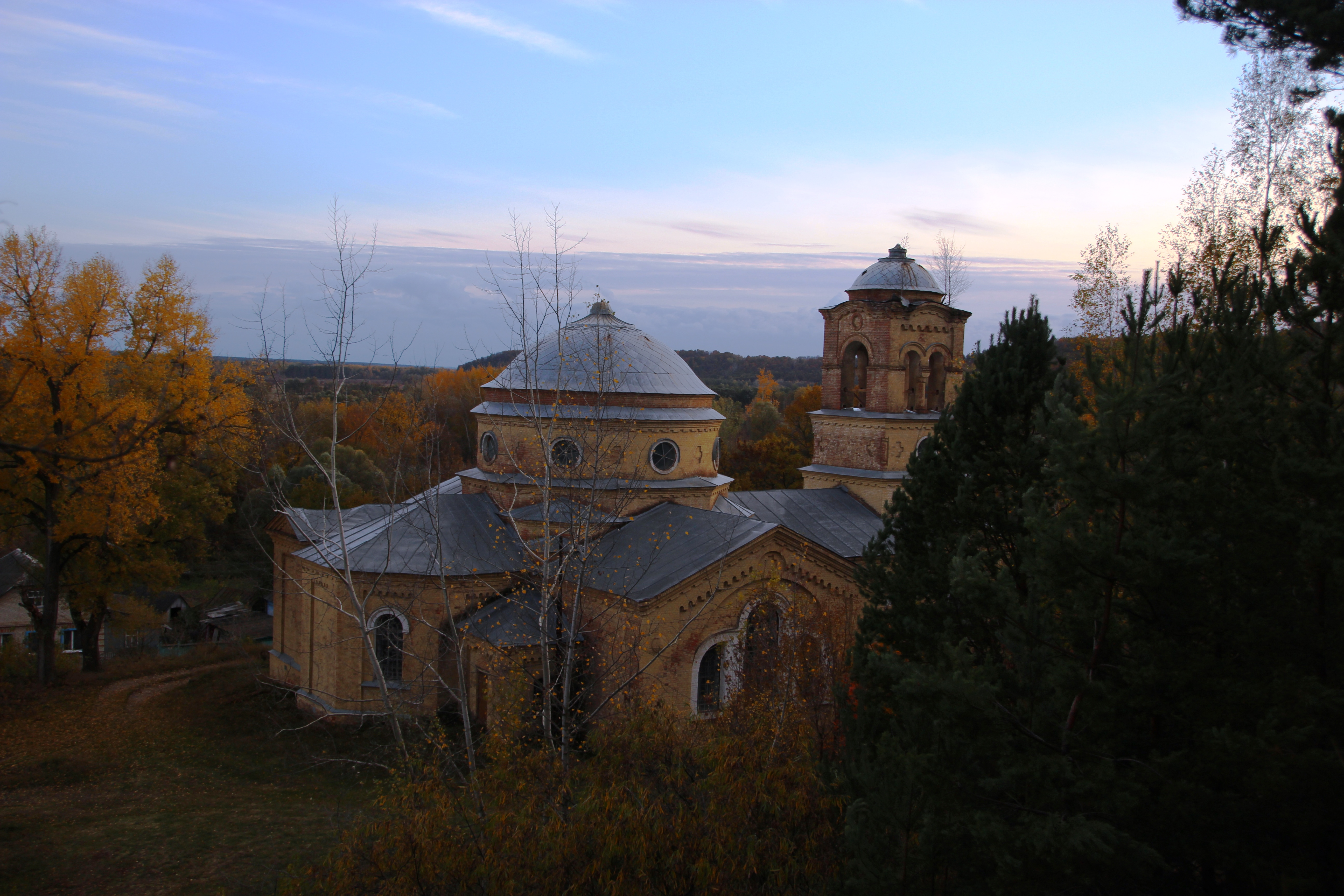 Михайлівська церква (мур.), село Курган, вул. Жовтнева, 67а